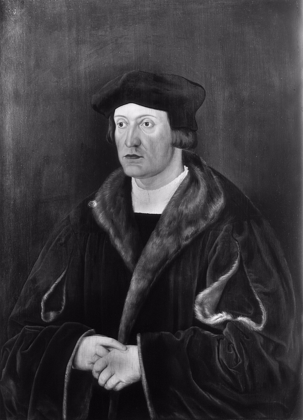 Ernst von Bayern (1500–1560), Administrator des Bistums Passau, Administrator des Erzbistums Salzburg